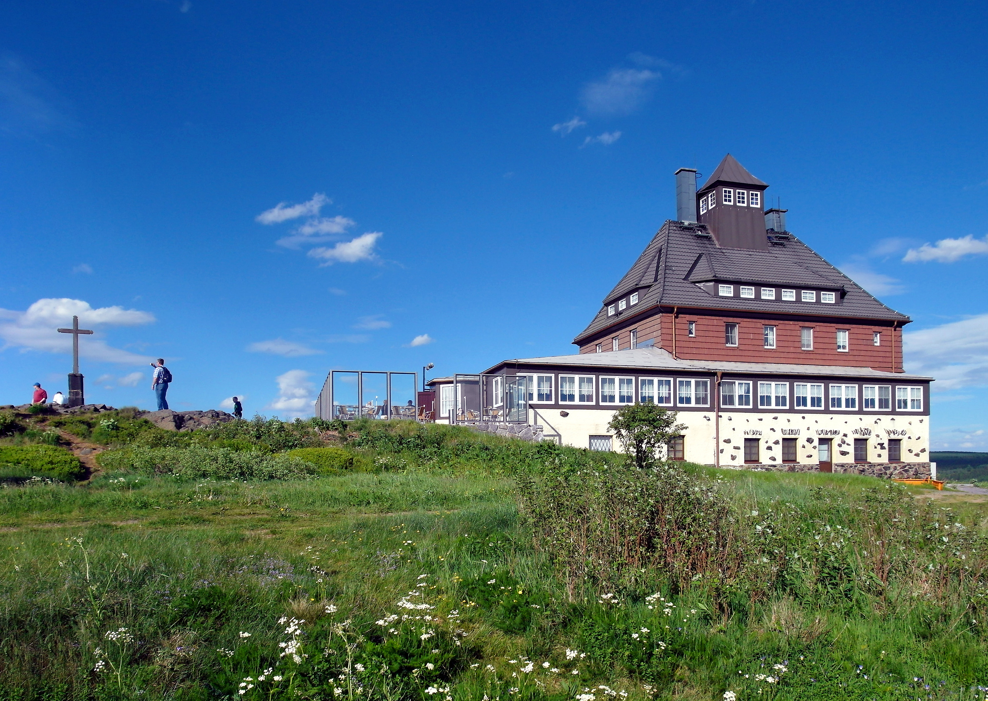 02.06.2015 09544 Neuhausen, Am Schwartenberg 10: Schwartenberg (789 m ü.NN). Bergbaude von 1926/27. Gaststätte und Hotel (GMP: 50.659046,13.465898). Sicht von Südwesten. [SAM0716.JPG]20150602415DR.JPG(c)Blobelt